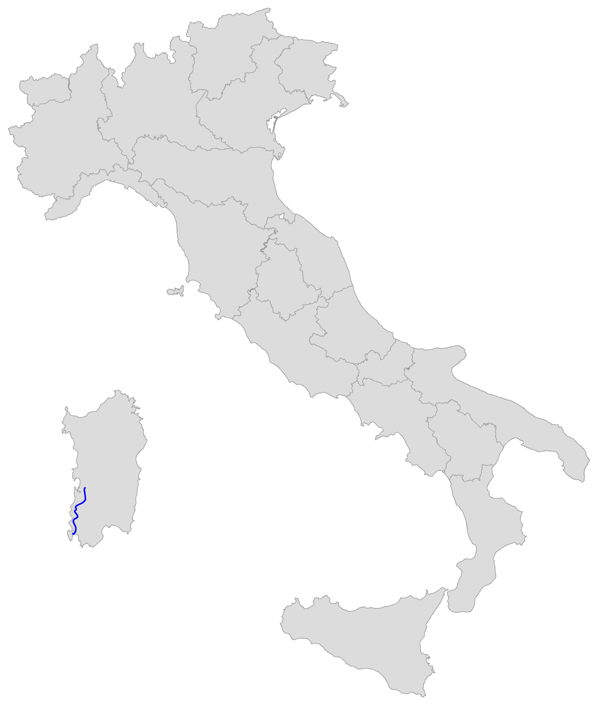 Percorso della SS 126 Sud Occidentale Sarda